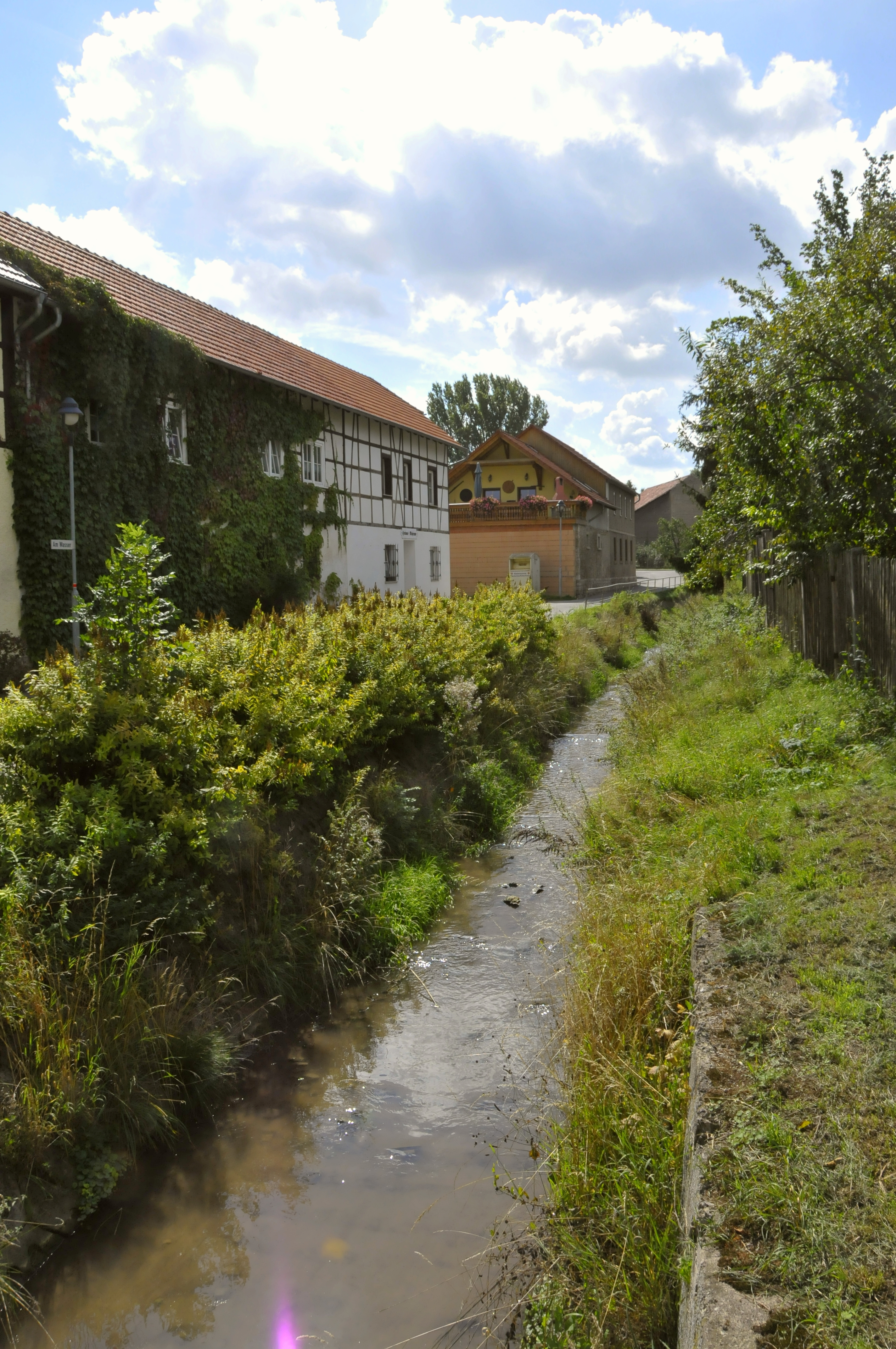 Burgtonna, Tonna-Bach